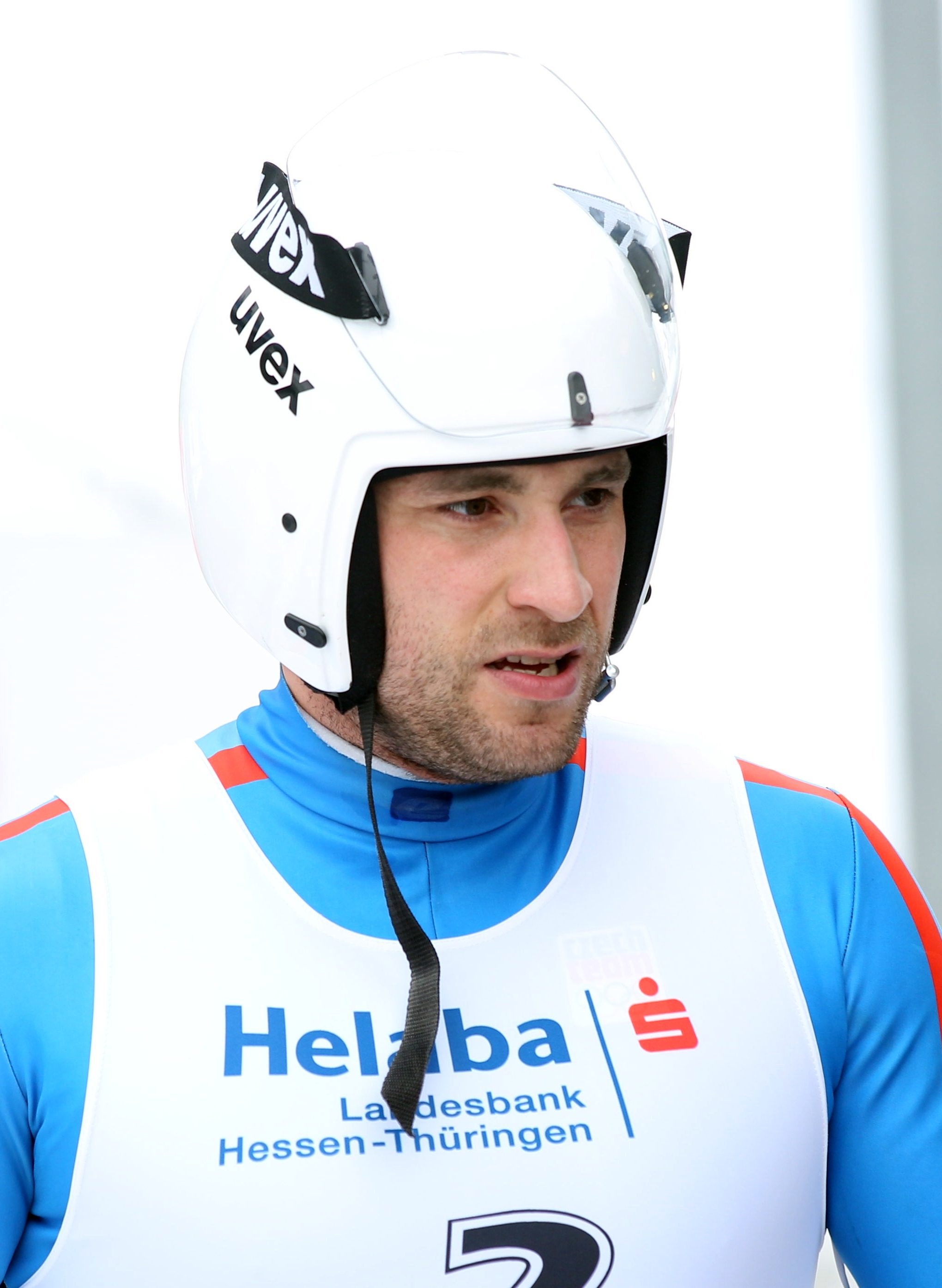 Lukas Broz beim HELABA Nationscup der Doppelsitzer in Oberhof 2017